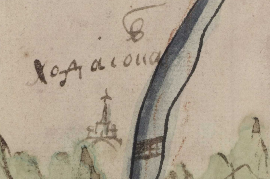 Фрагмент карти Київської губернії. XVIII століття. РГАДА, ф. 192, оп. 1, Киевская губ., № 5.